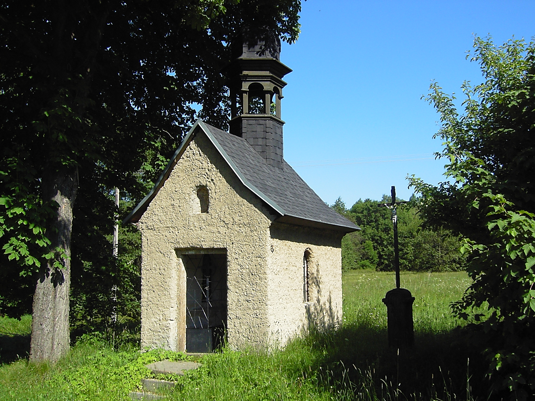 Kaple svatého Cyrila a Metoděje v Kunraticích u Šluknova